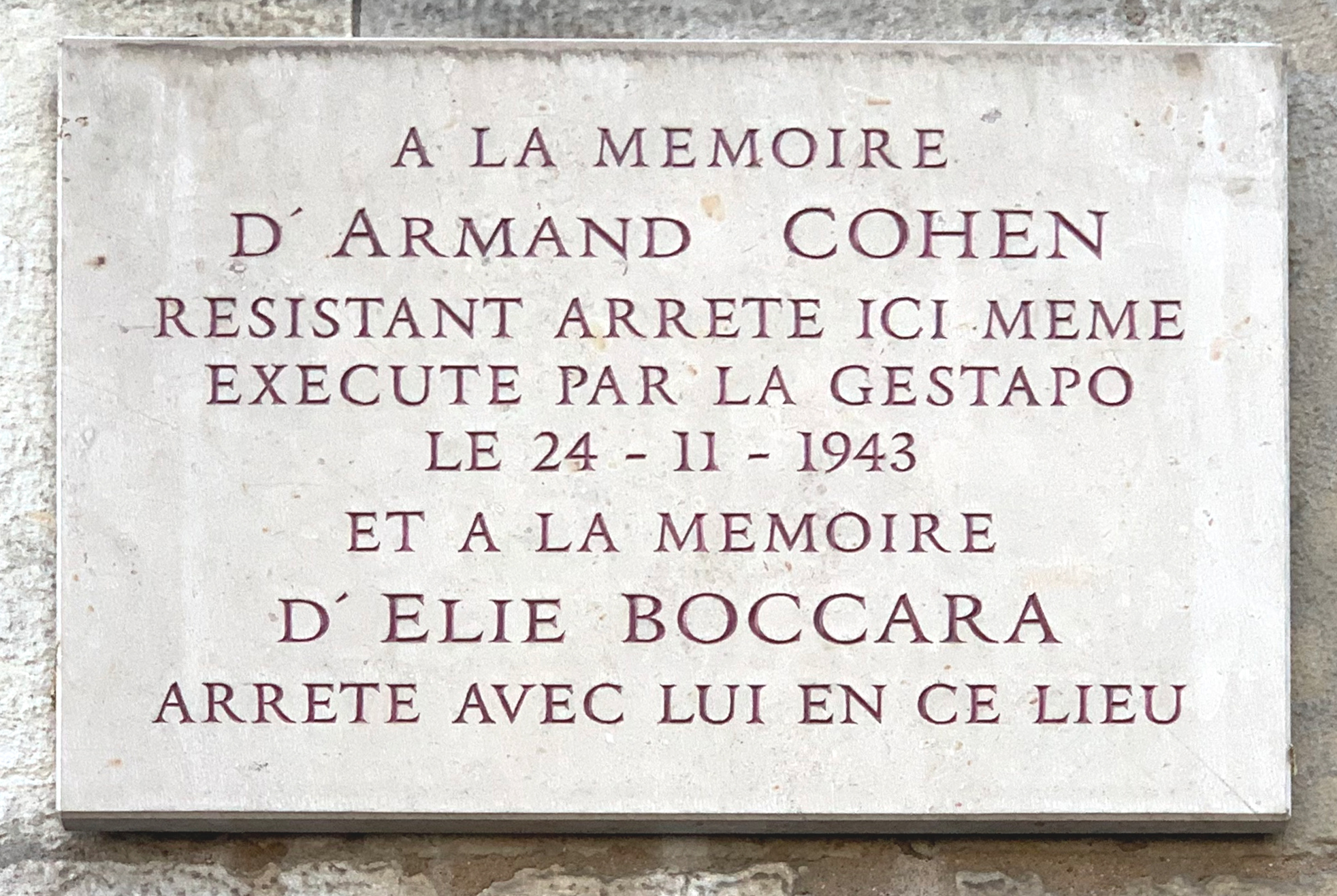 Plaque à la mémoire d'Armand Cohen et à celle d'Élie Boccara, Place Tolozan (Lyon). recto in engraving: A LA MEMOIRE D'ARMAND COHEN RESISTANT ARRETE ICI MEME EXECUTE PAR LA GESTAPO LE 24-11-1943 ET A LA MEMOIRE D'ELIE BOCCARA ARRETE AVEC LUI EN CE LIEU